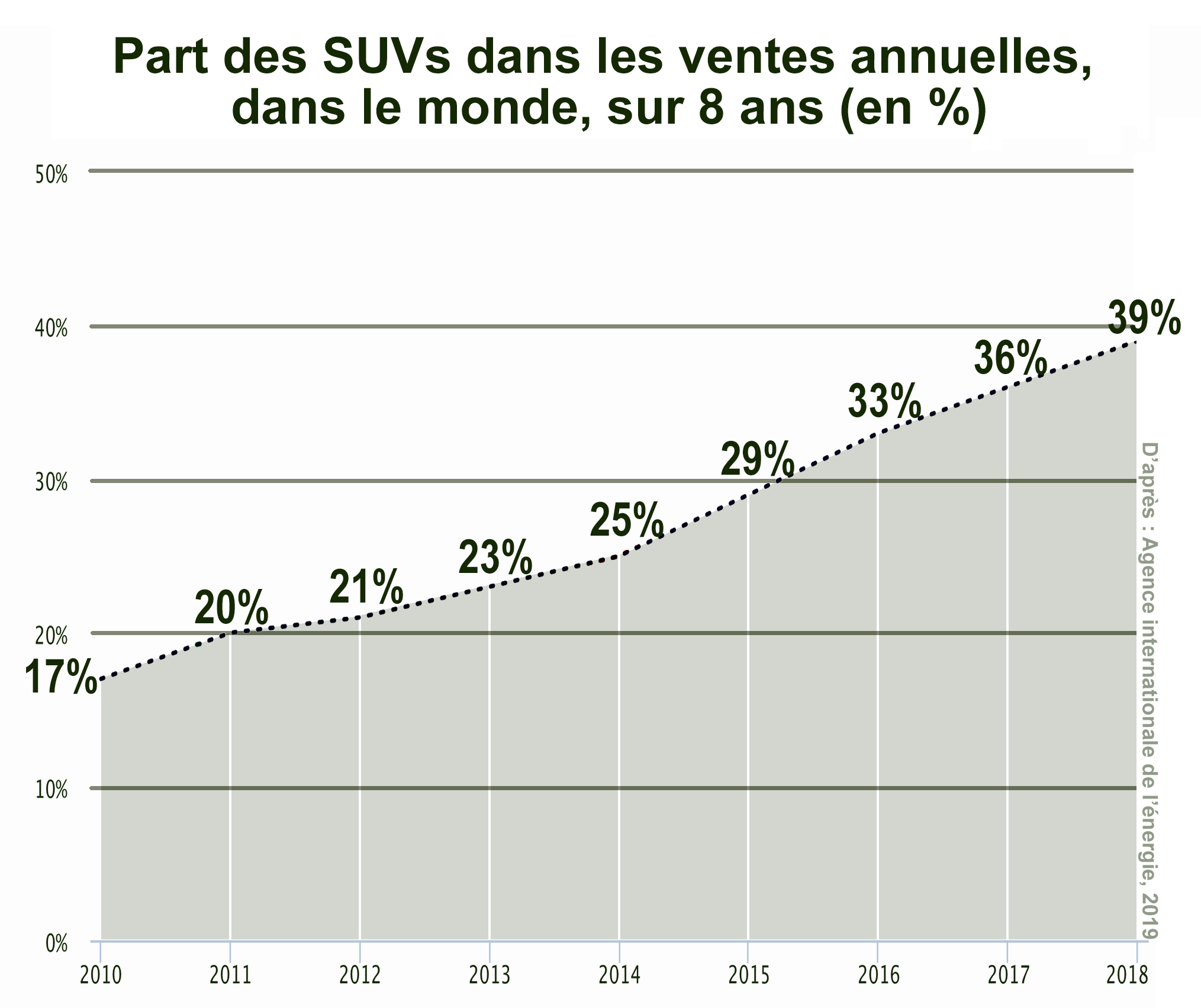 En 2019 le directeur de l'Agence internationale de l'énergie (AIE) alerte sur le fait que de 2010 à 2018 les SUV ont été la seconde source d'augmentation des émissions de dioxyde de carbone (CO2) dans le monde. Et la tendance est à l'aggravation : alors qu'en 2010, 18% des voitures vendues dans le monde étaient des SUV, en 2018 ils ont constitué plus de 40% des vente4. Après le secteur de l'énergie, mais avant l'industrie lourde (= aciéries + cimenteries + usines d'Aluminium + industrie chimique + Industrie du papier), et avant les poids lourds ou l'aviation, les 200 millions de SUV qui roulaient en 2018 dans le monde (contre 35 millions en 2010) sont devenus la seconde source de GES. Par exemple, les SUV en circulation ont émis en 2018 plus de deux fois plus de CO2 que la totalité des avions5. Ils expliquent à eux-seuls la demande supplémntaire de pétrole issue de l'automobile de 2010 à 2018, effaçant le bénéfice des efforts faits pour rendre les voitures plus petites et plus sobres ou électrique4. Au rythme des 8 dernières années, si la la mode des SUV se poursuit : près de 2 millions de barils/jour de plus seront à extraire de 2019 à 2040, annulant totalement les économies d'émissions de gaz à effet de serre attendues de 150 millions de voitures électriques